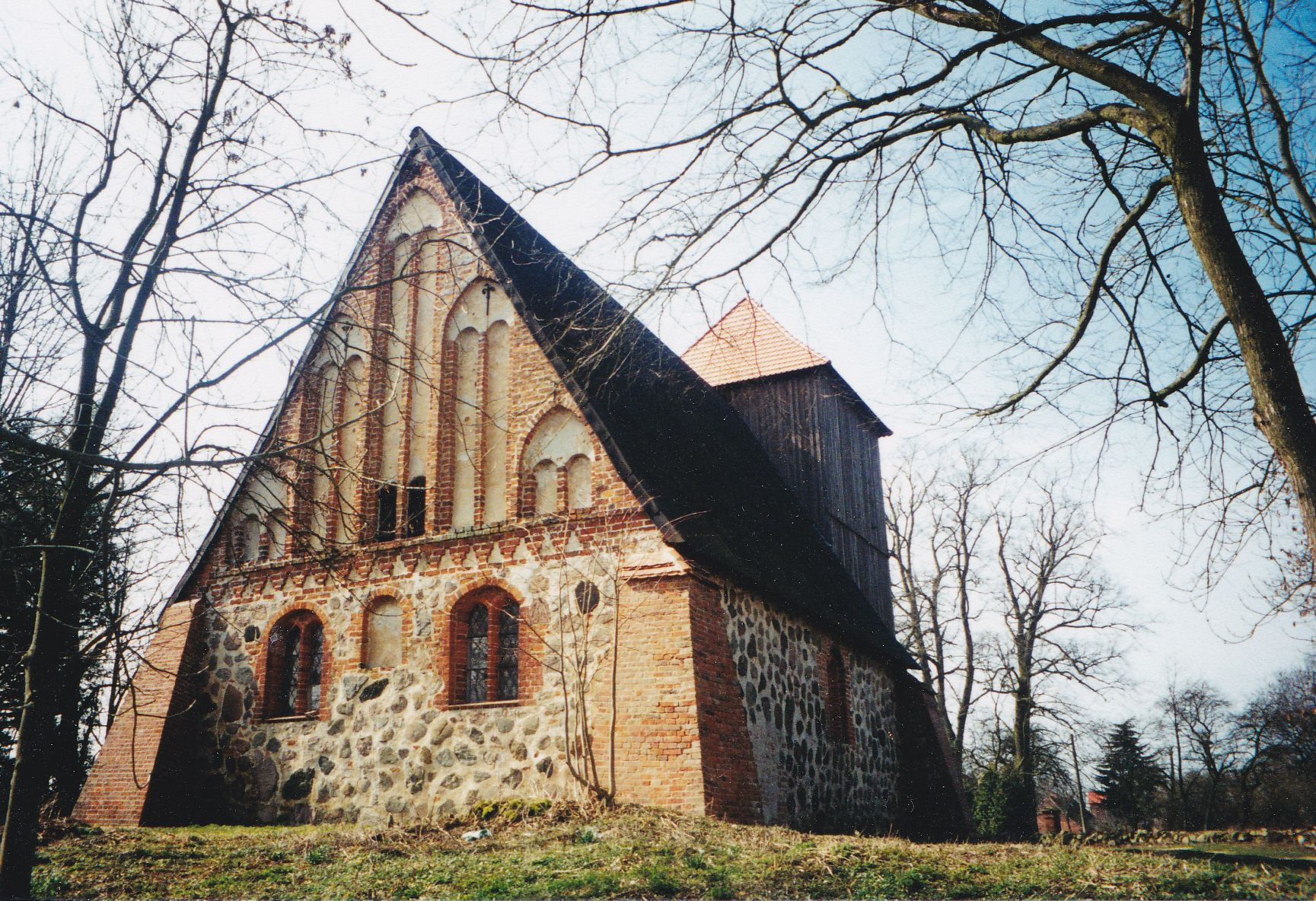 Giebel (rückwärtige Ostseite) der Dorfkirche Ruest